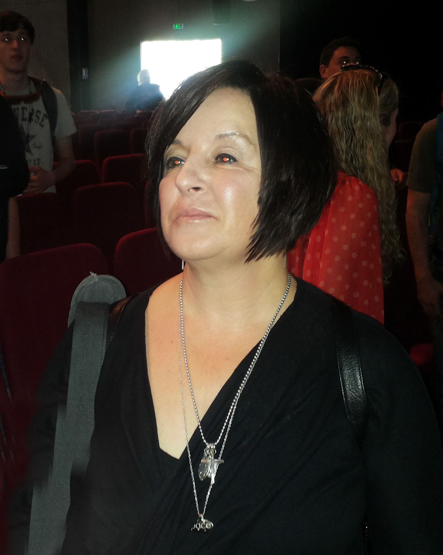 Dorothy McKim au Festival International du Film d'Animation d'Annecy le 11 juin 2013